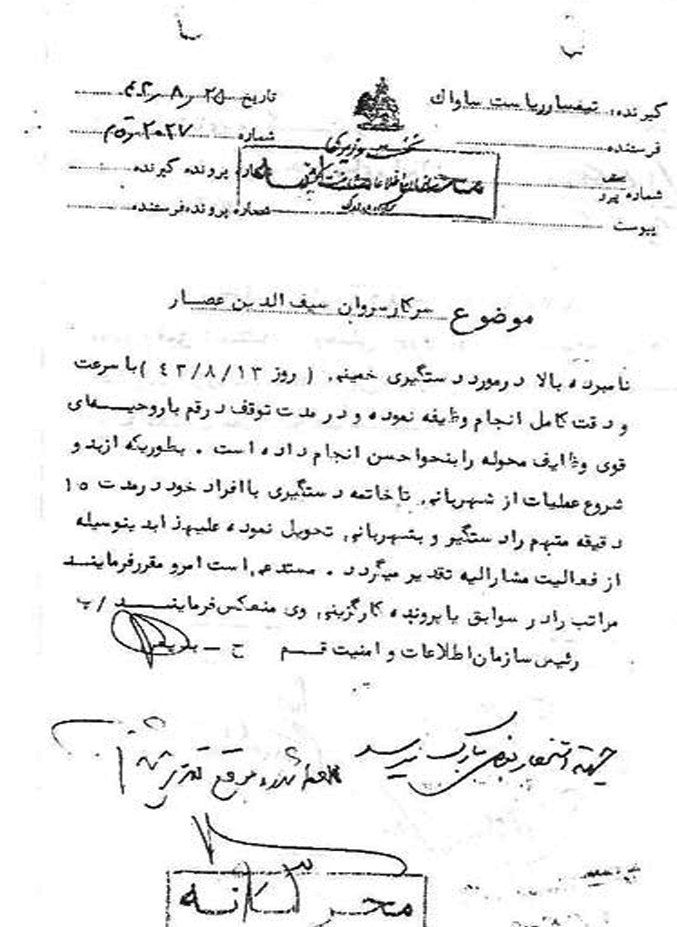 نامه تشویق سیف‌الدین عصار در مورد دستگیری خمینی